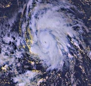 Hurricane Isidore as a major hurricane